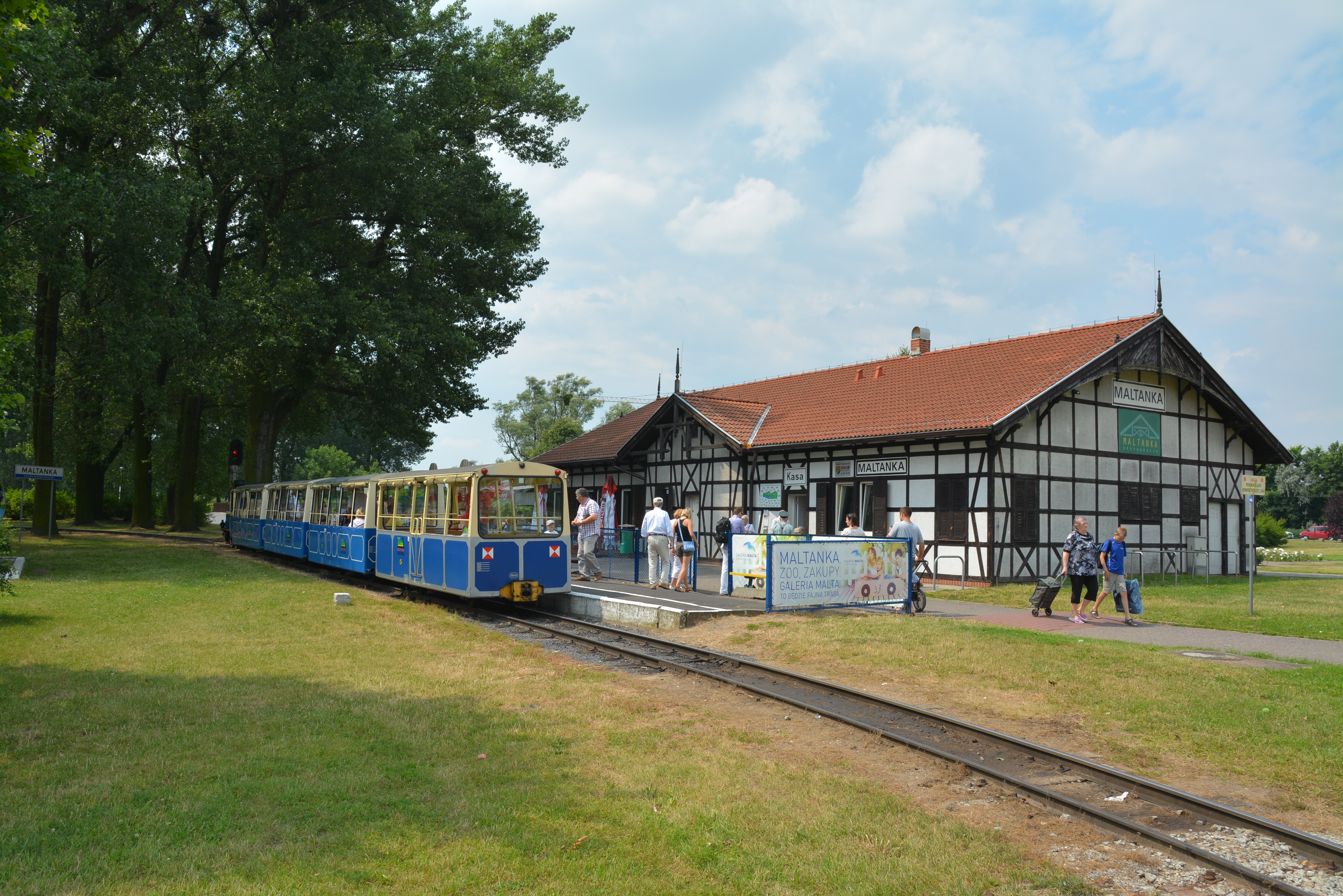 Stacja "Maltanka" w Poznaniu